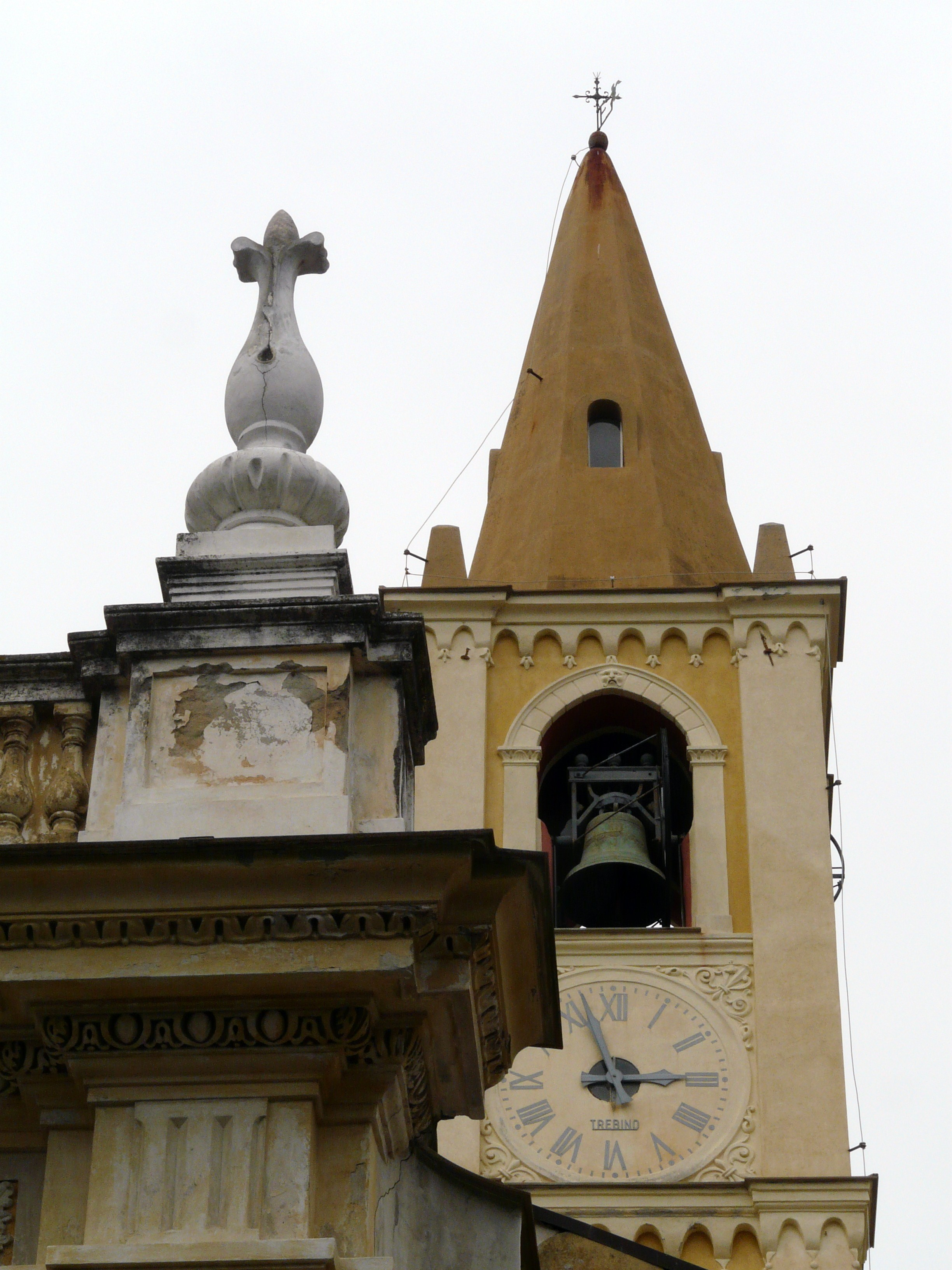 Campanile della chiesa di San Michele, Celle Ligure, Liguria, Italia